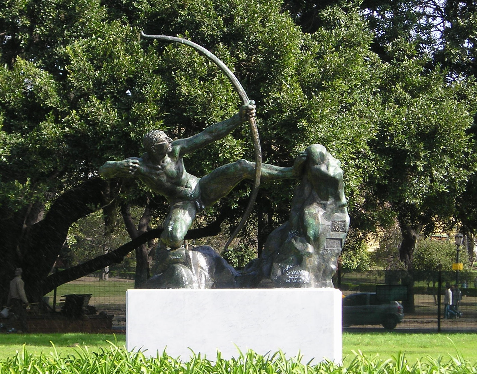 El arquero (The archer). Antoine Bourdelle. Buenos Aires (Recoleta). Argentina